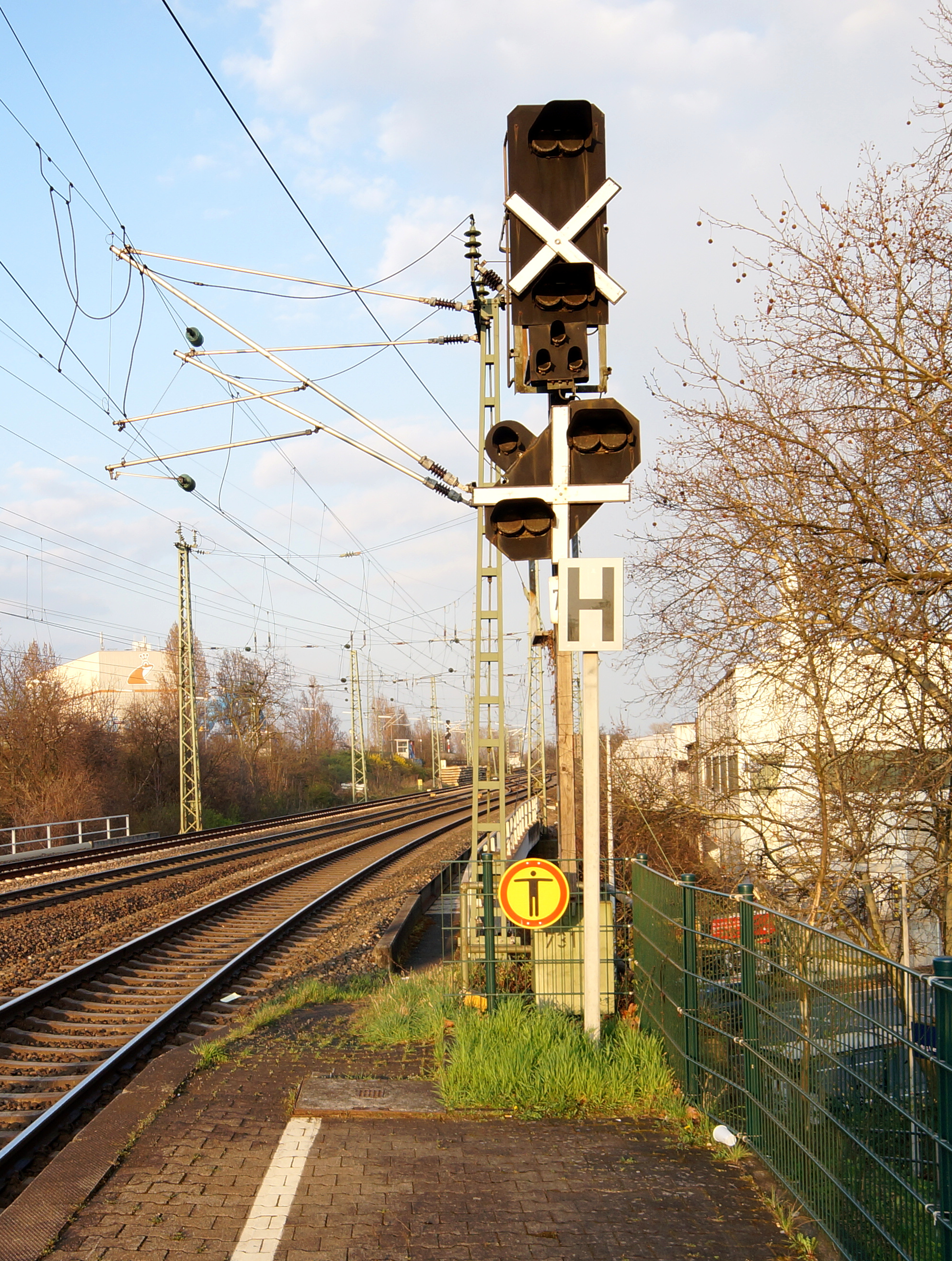 Das mit einem weißen Kreuz mit schwarzem Rand gekennzeichnete ungültige Blocksignal 731 an der Abzweigstelle Kaiserbrücke West. Westlich des Blocksignals 731 befindet sich der Bahnsteig zum Gleis 1 der Haltestelle Mainz Nord. Diese Form der Signalungültigkeit steht in der Ril 301 (Signalbuch) der DB Netz AG (301.0002.9).